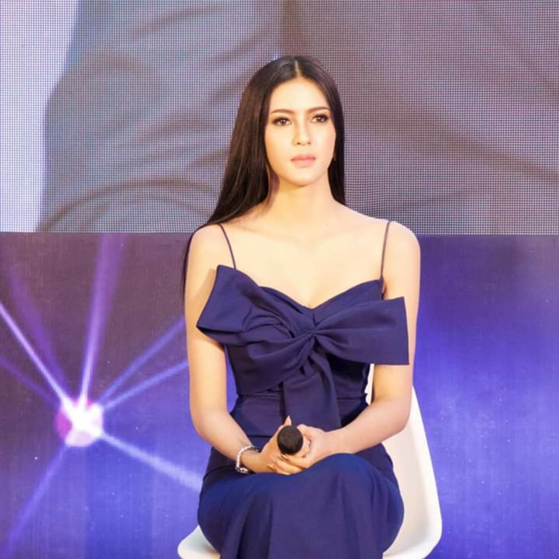 ລາວ: ນຸ້ຍ ສຸພາພອນ ສົມວິຈິດ